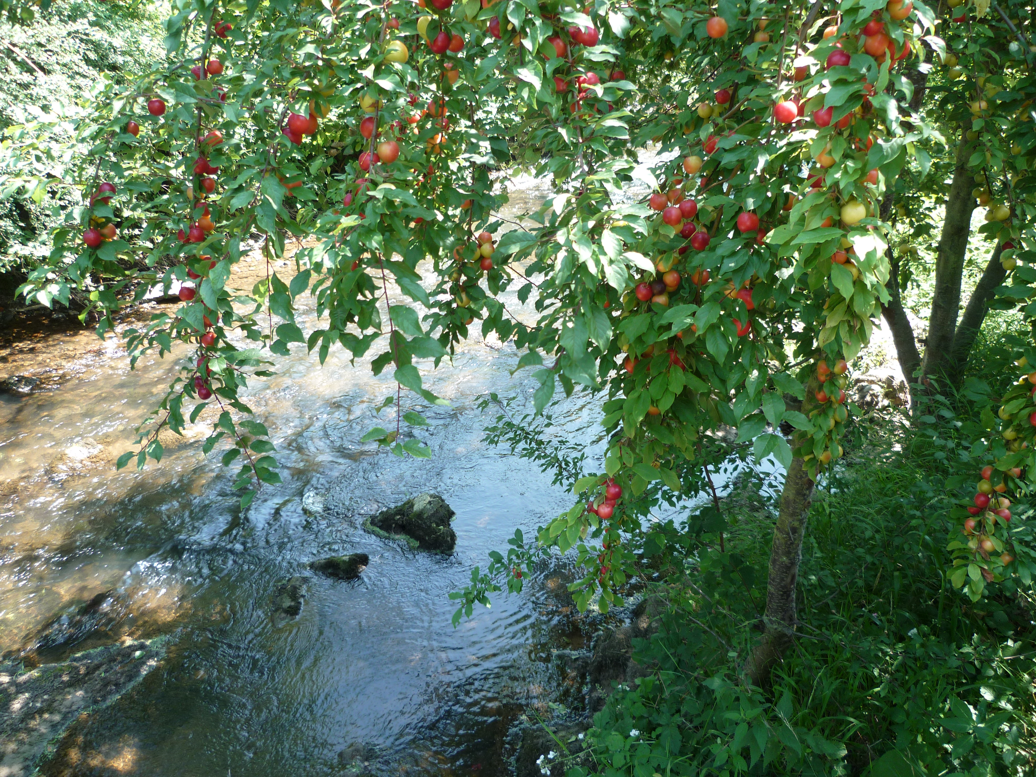 Saint-Girons (Ariège, France) : Le Baup.